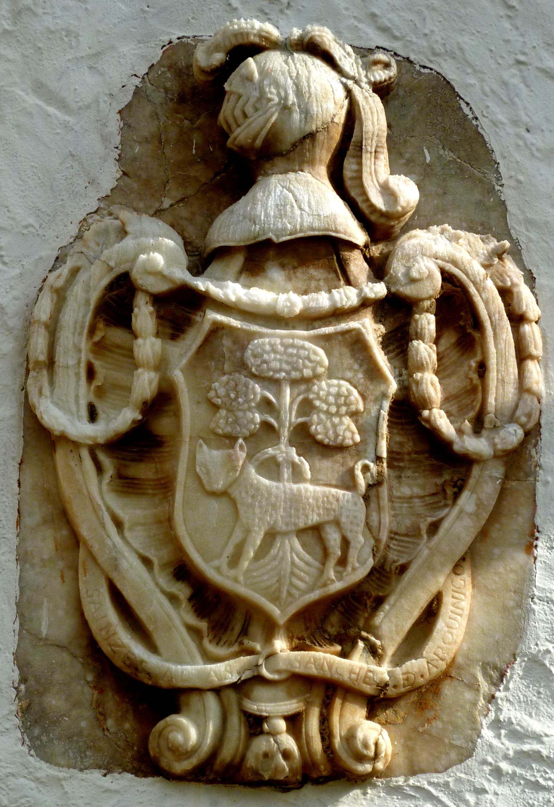 Santuari de Santa Maria de Bell-lloc (Palamós)